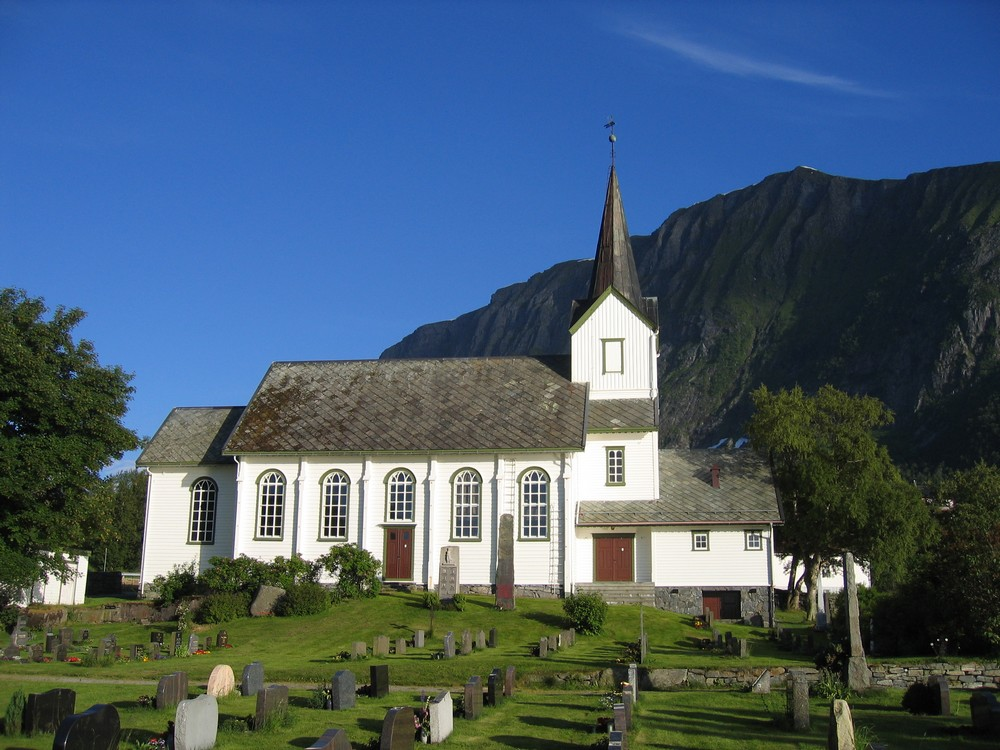 Vartdal Kyrkje, Ørsta Norway